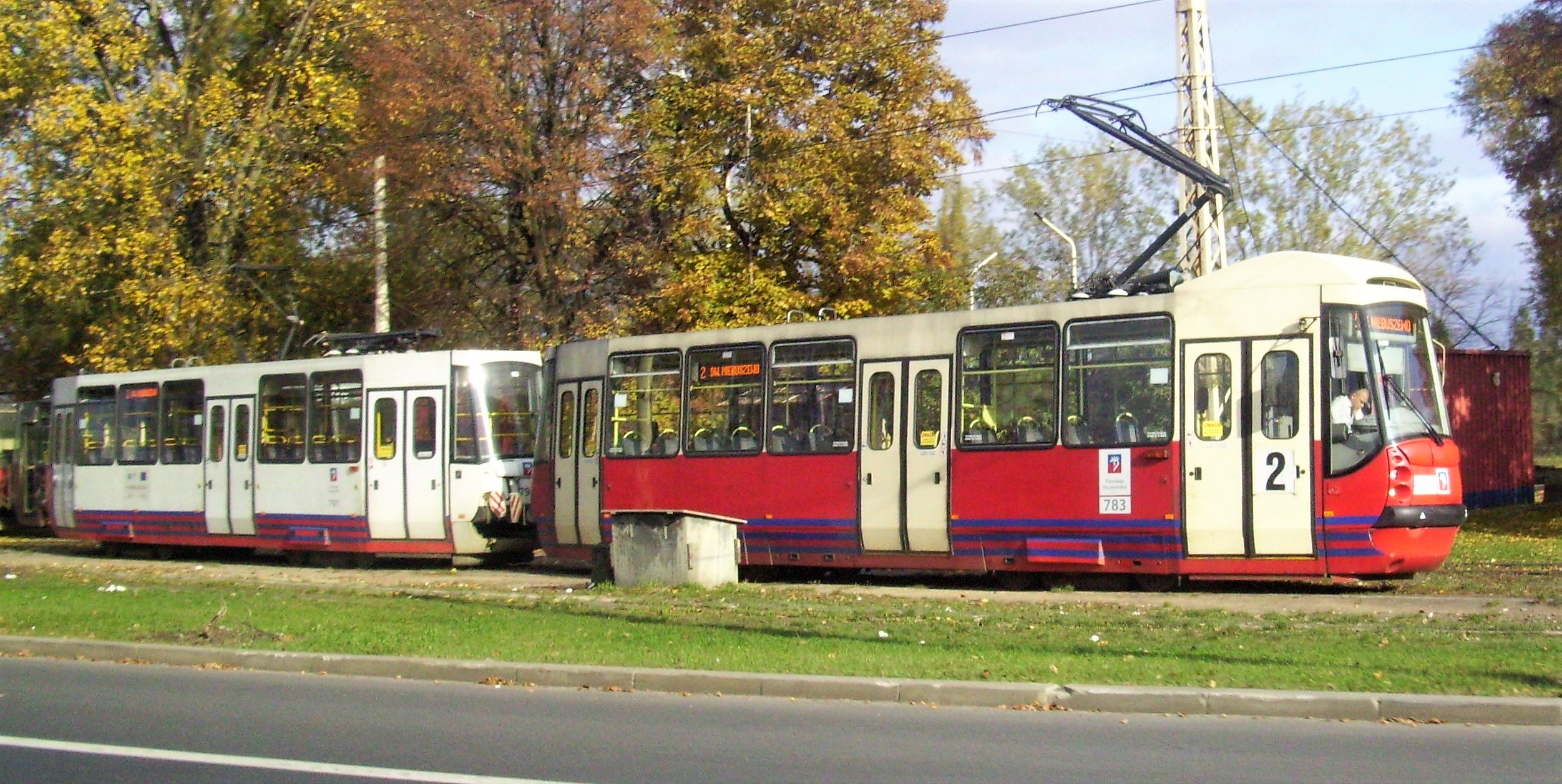 Tramwaje Bulwa na Basenie Górniczym w Szczecinie